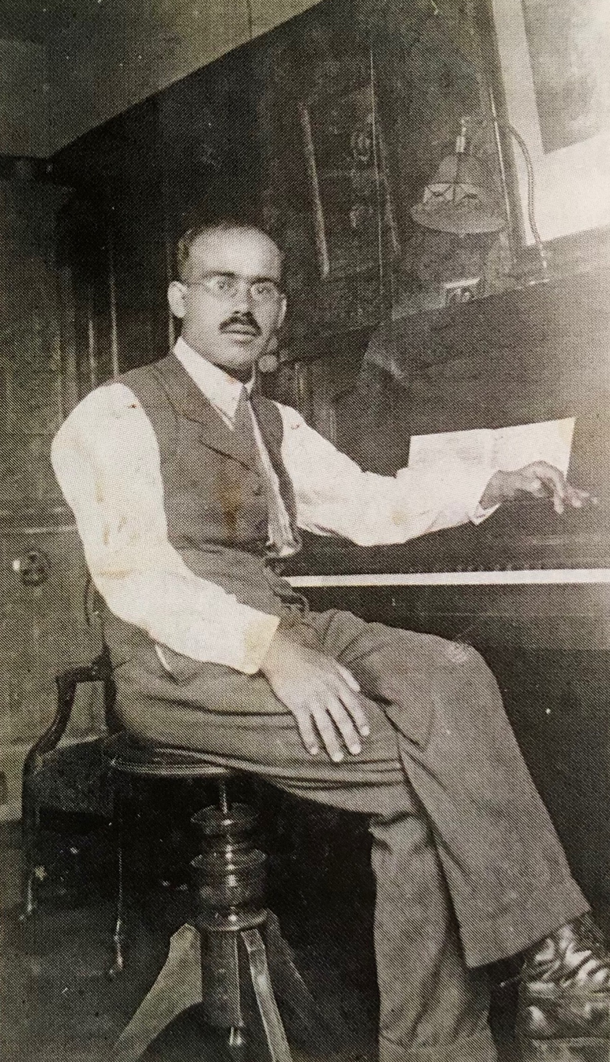 Tumasch Dolf, am Klavier in Zillis, um 1925